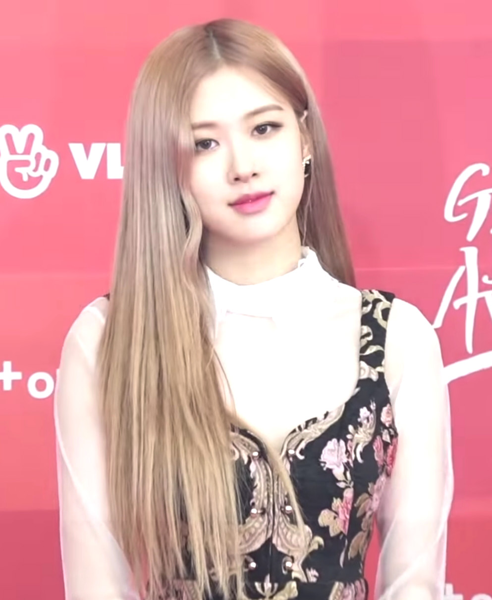 20190106 (NEWSEN) 블랙핑크(BLACKPINK), 수줍은 많은 소녀지만 돋보이는 아름다운 미모 (Glden Disc Awards 2019)